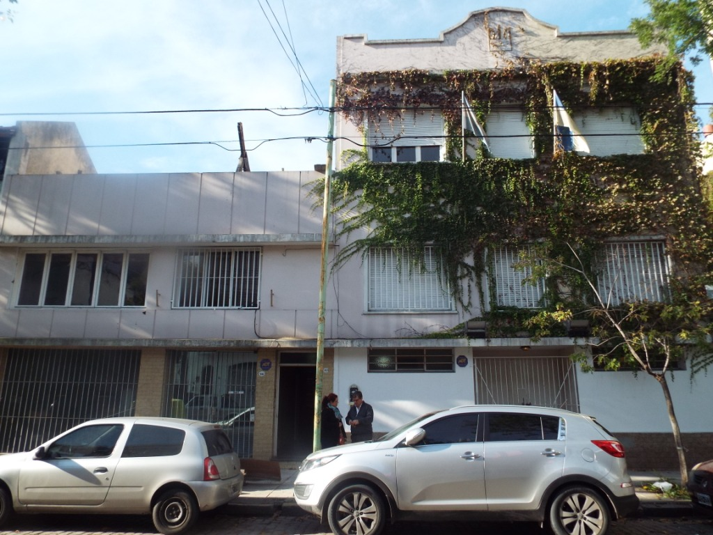 Будинок культурного товариства "Просвіта" в м. Буенос-Айрес, 2017 р. Фото І. Парнікози